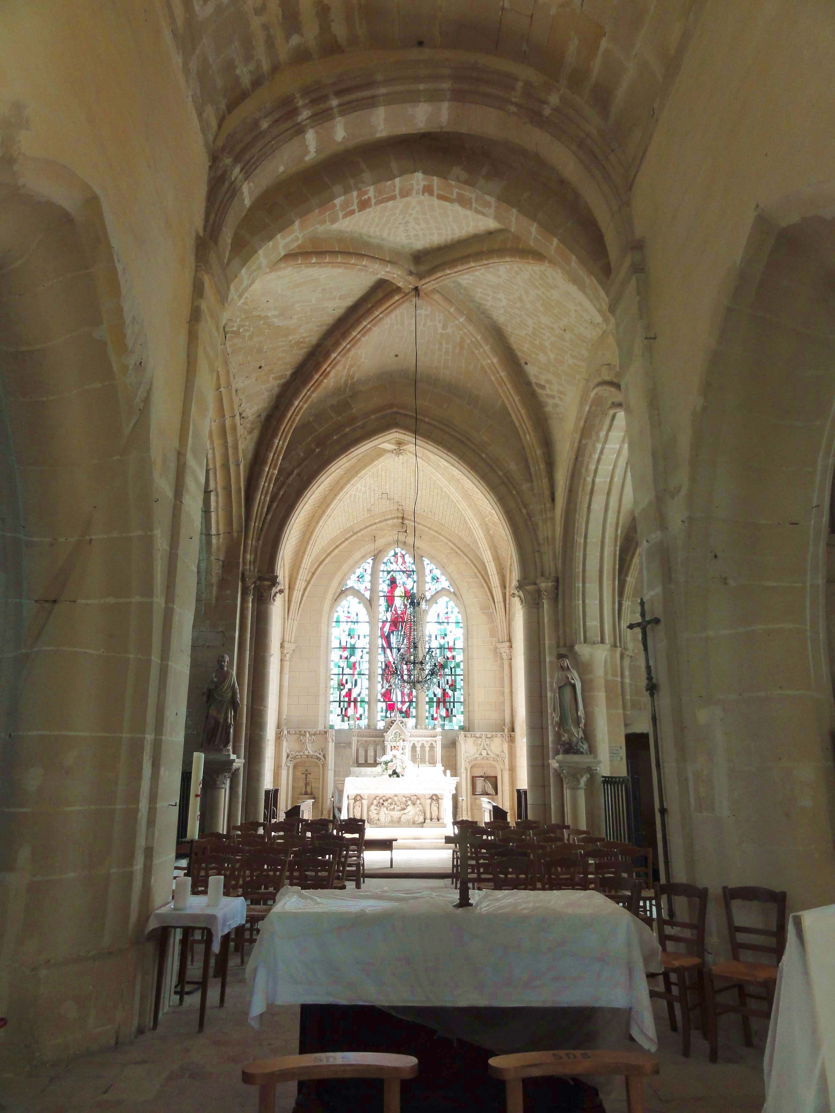 Intérieur de l'église - voir titre.